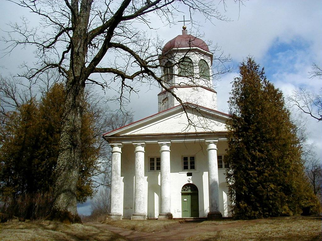 Drustu baznīca 2001-04-13